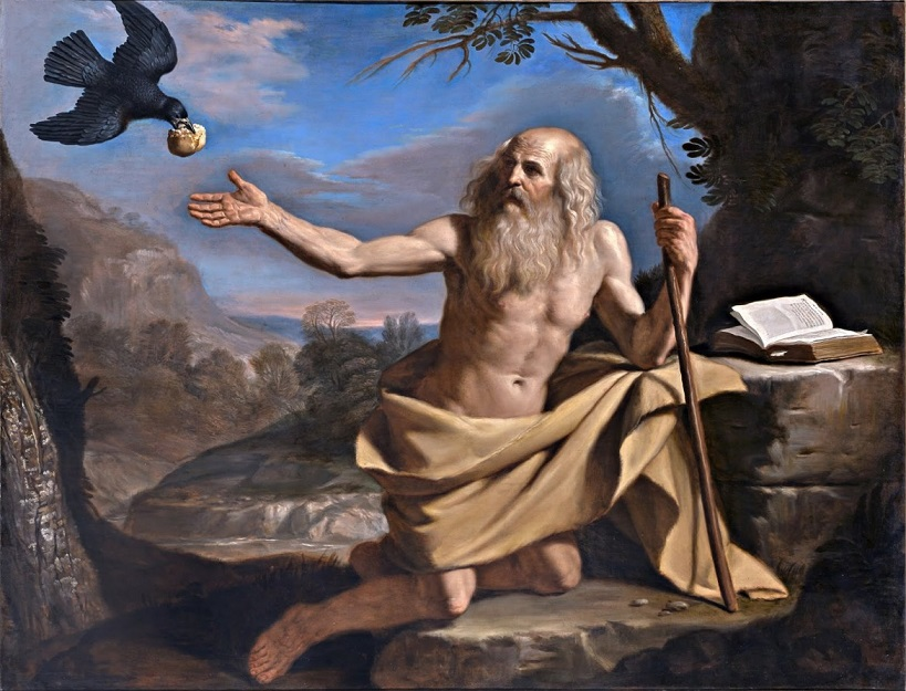 Guercino, San Paolo eremita nutrito dal corvo, olio su tela, 178 x 233 cm, Pinacoteca Nazionale di Bologna